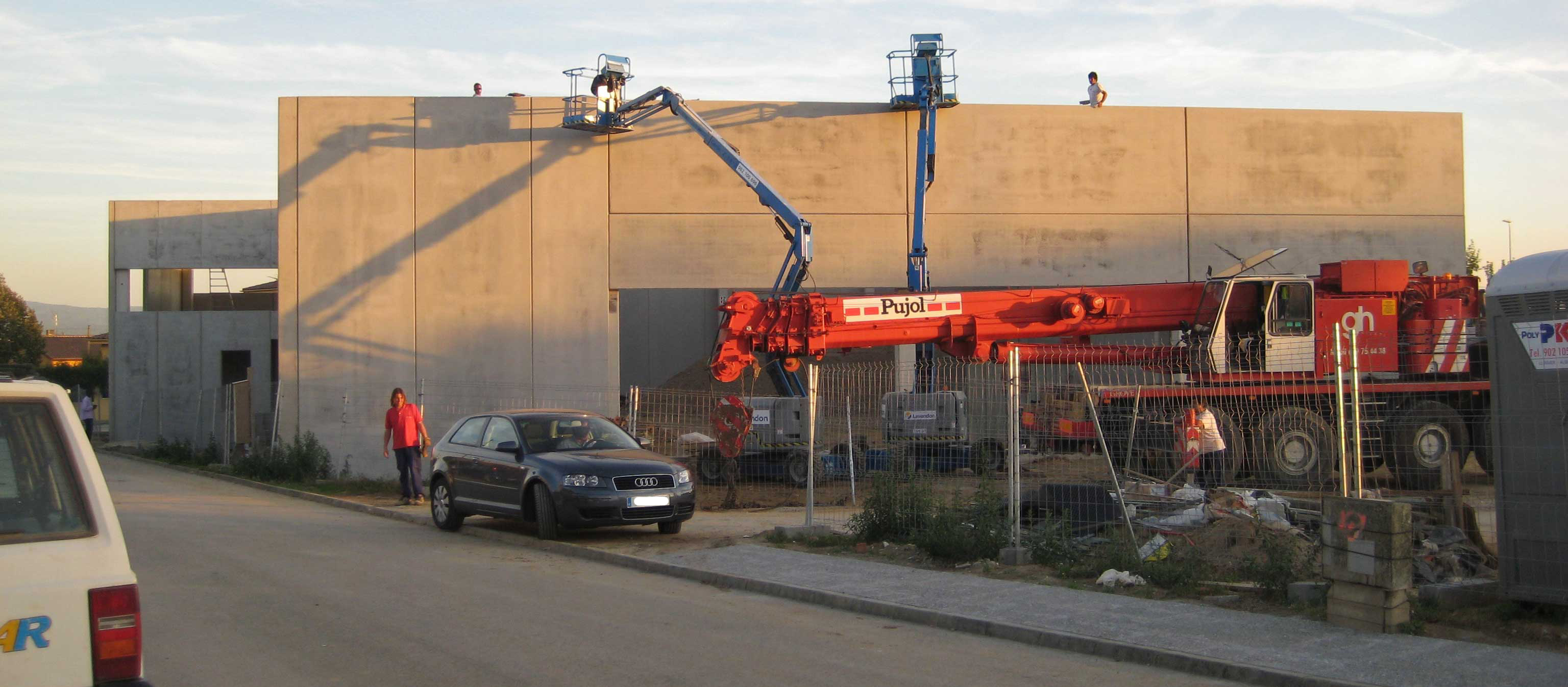 Construcción de una nave industrial en la calle Bastiments de Sils